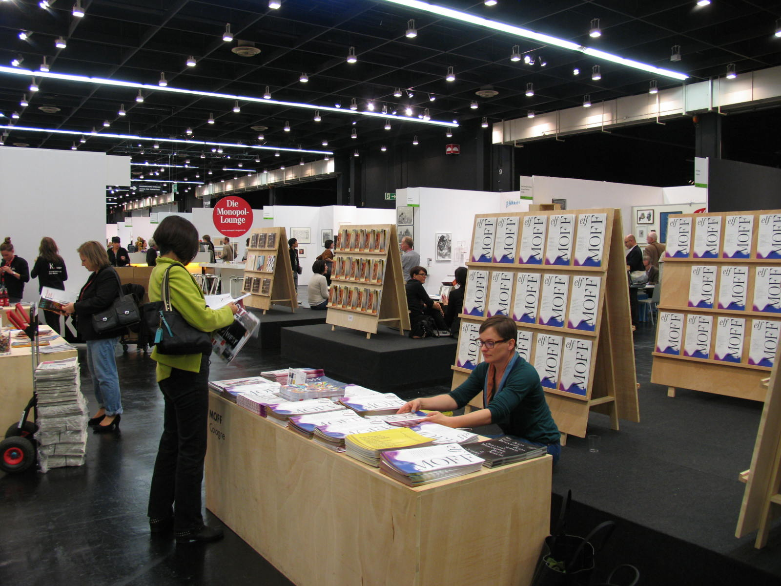 Stand des MOFF-Magazins auf der Art Cologne mit der Künstlerin Stefanie Klingemann